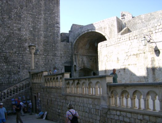 Dubrovnik